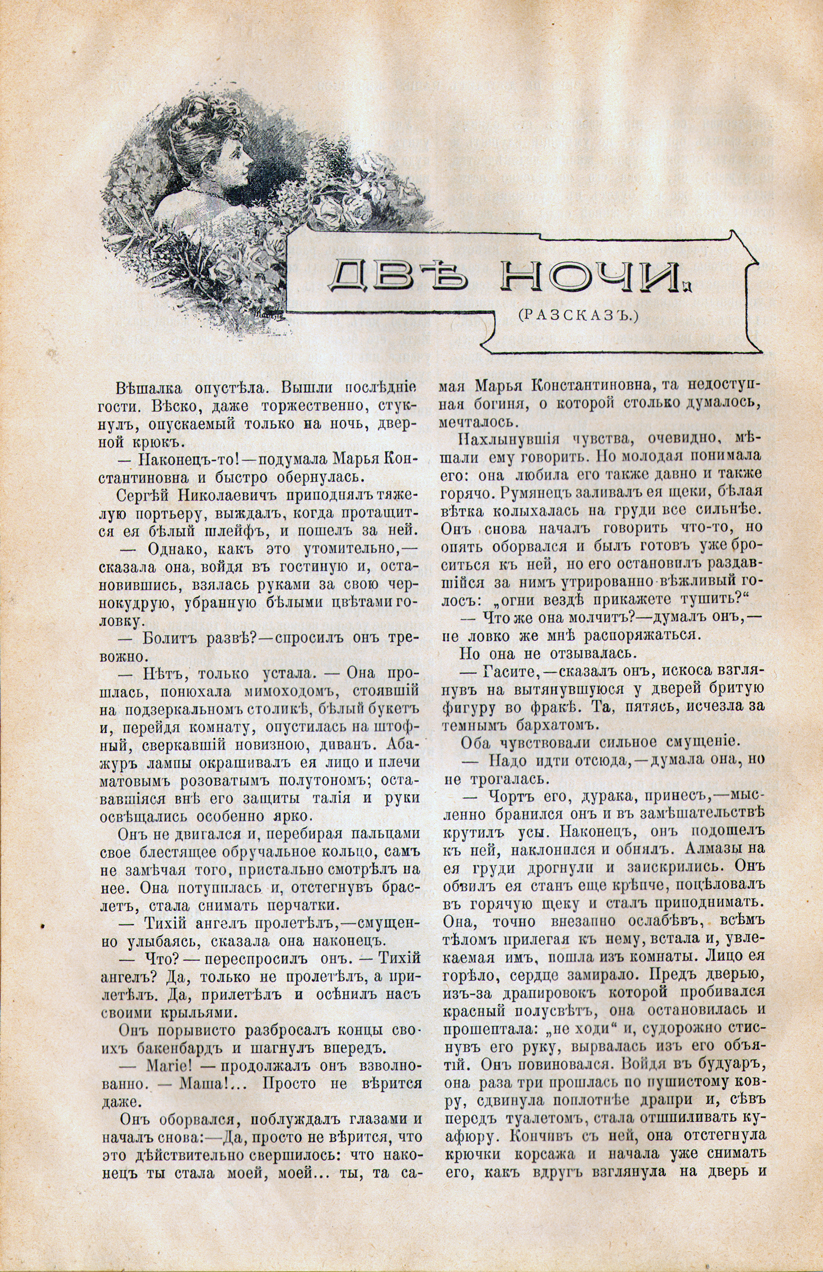 "Две ночи", рассказ Е. П. Гославского, журнал "Артист", 1893, № 31